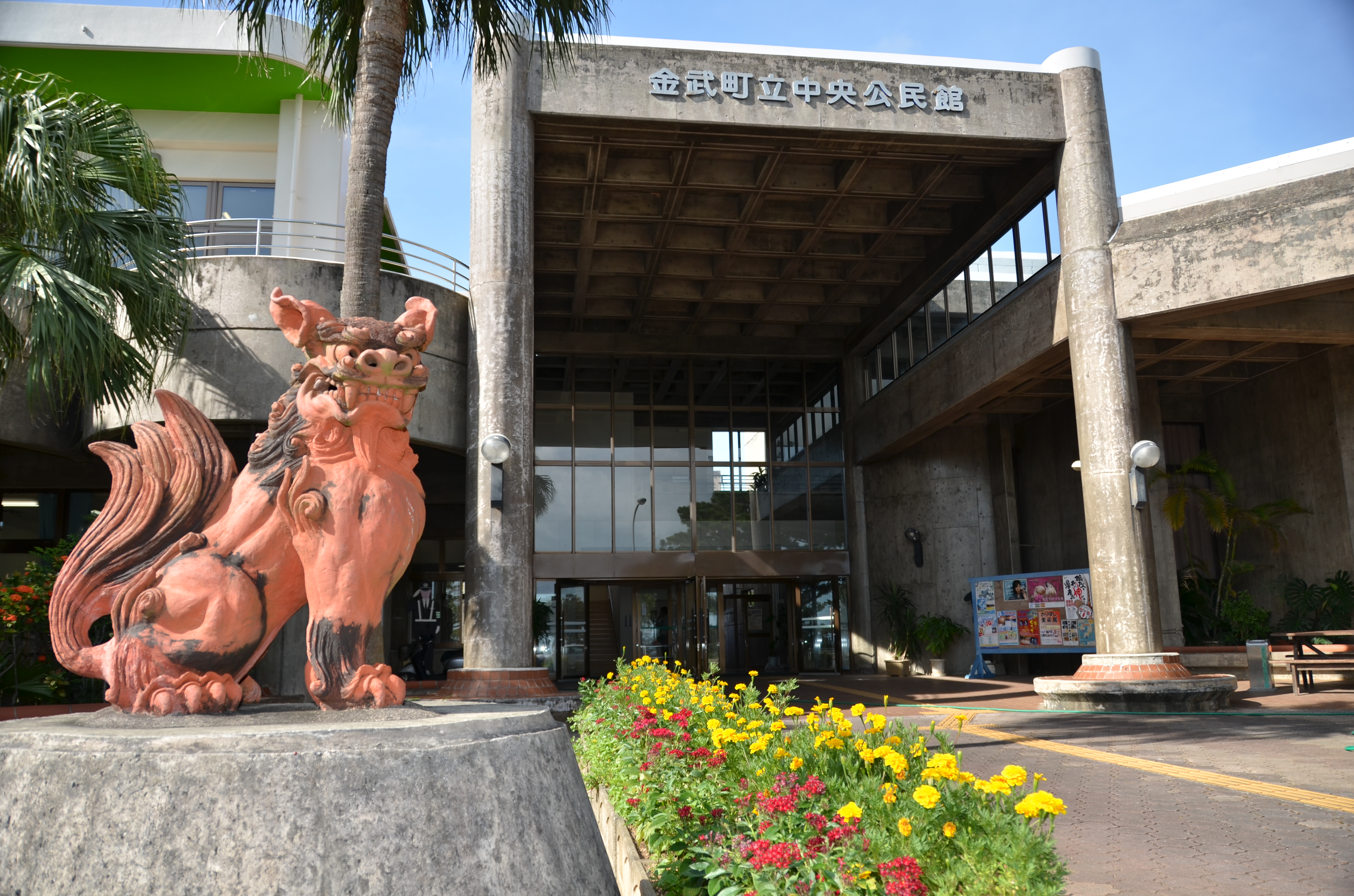 沖縄県金武町の中央公民館